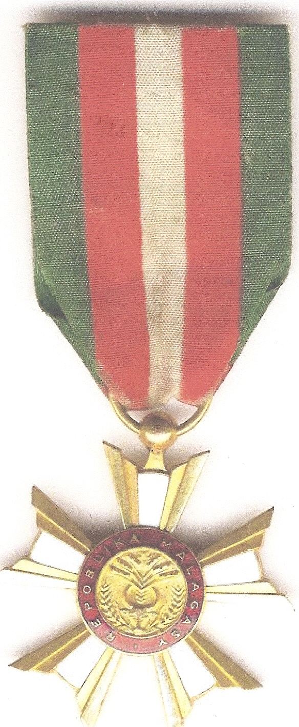 Crioix du mérite de Madagascar